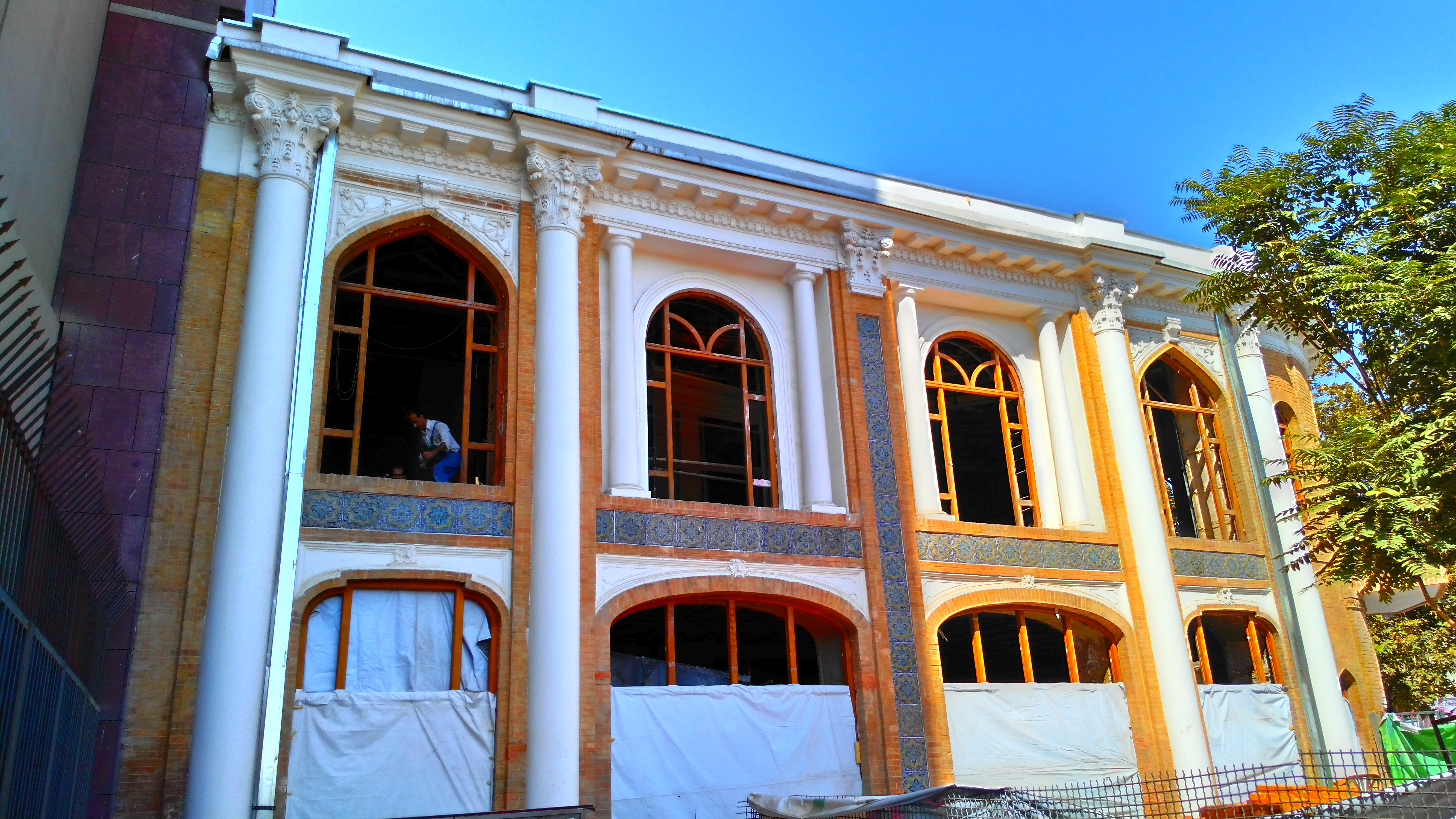 موزه صنعتی ۱۳ آبان